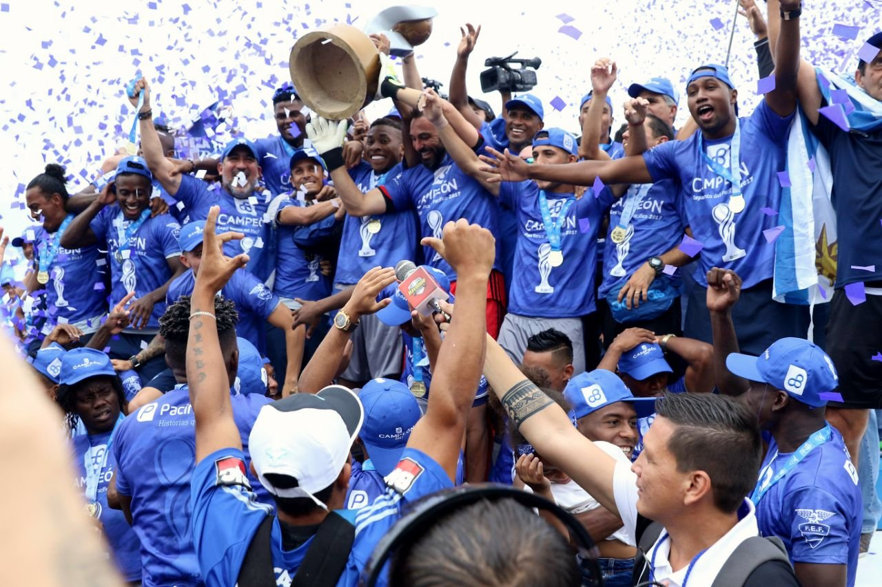 Manta, 17 diciembre de 2017 (Andes).- Emelec se consagró campeón por decimocuarta ocasión en el fútbol de Ecuador tras vencer 2-0, con goles de Ayrton Preciado y Bryan Angulo, a Delfín SC este domingo en el estadio Jocay de Manta y con un marcador global de 6-2 logró el título nacional. Foto: Micaela Ayala V.